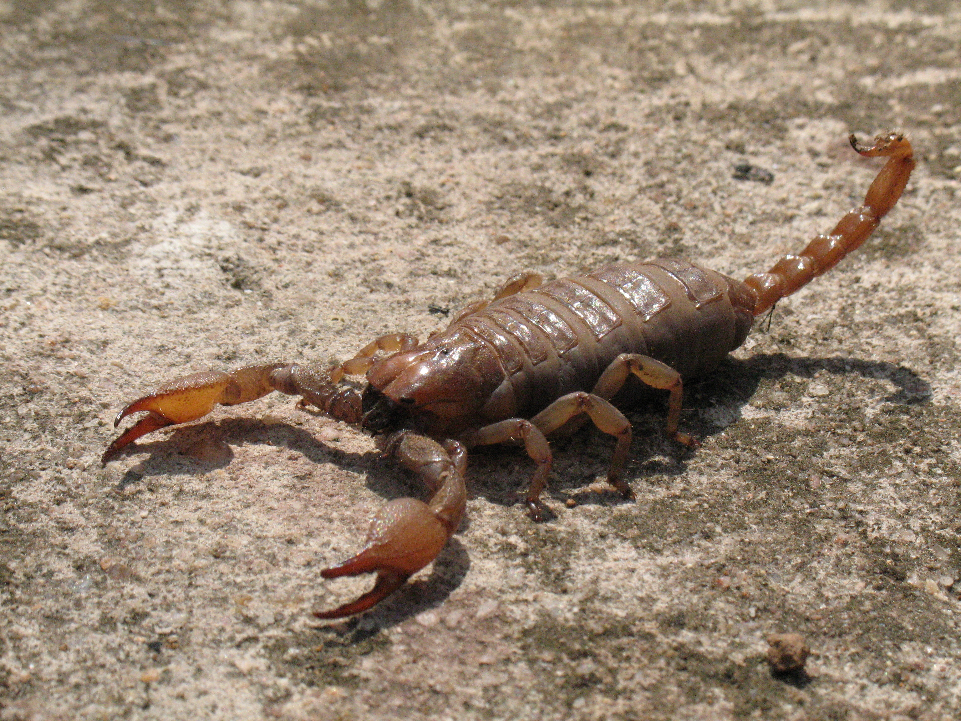 Scorpion d'Afrique du Sud, par BafS